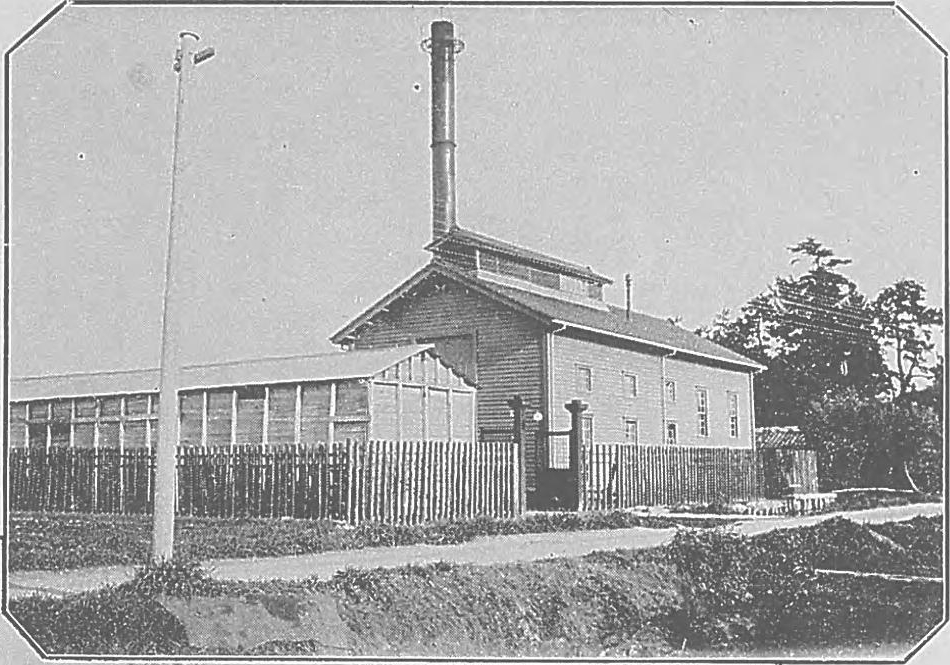 富山市にあった奥田火力発電所。説明文に「富山市及び附近の電燈並に電気を供給する所のもの二あり共に富山電燈株式会社の事業に属し一は上新川郡大久保村に於て神通川の水力を仮り一は同郡奥田村に於て火力を使用す」とあり。